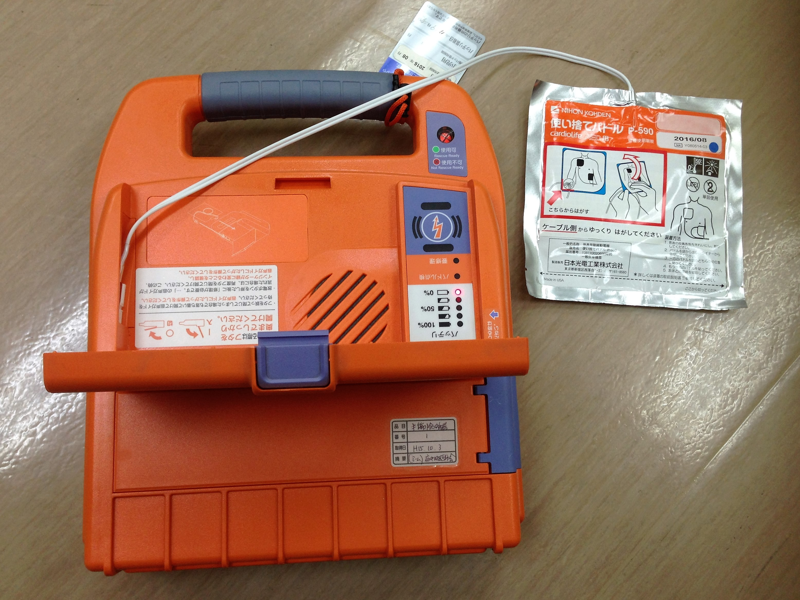 日本光電製AED（パットを取り出したところ）